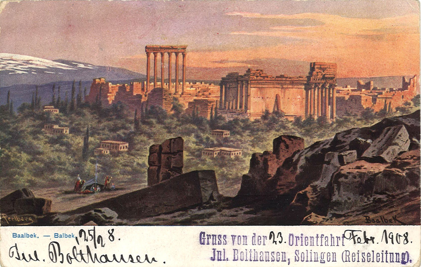 Ansichtskarte von der 23. Orientreise Jul. Bolthausens (ca. 1908), Design: Friedrich Perlberg (1848-1921)